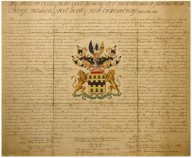 Het adelsdiploma van de Bye